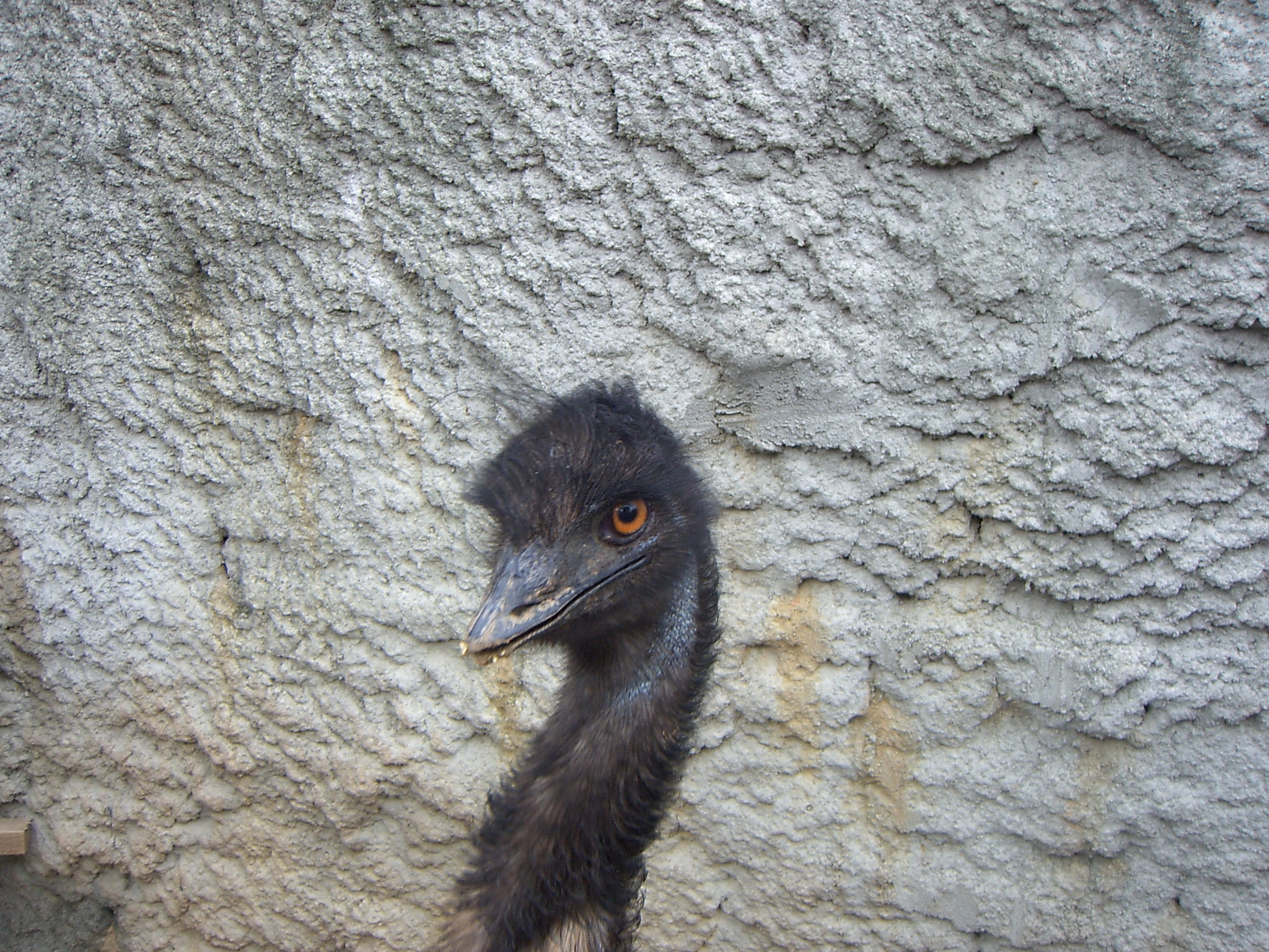 Emu at Zoo in Hsinchu, Taiwan